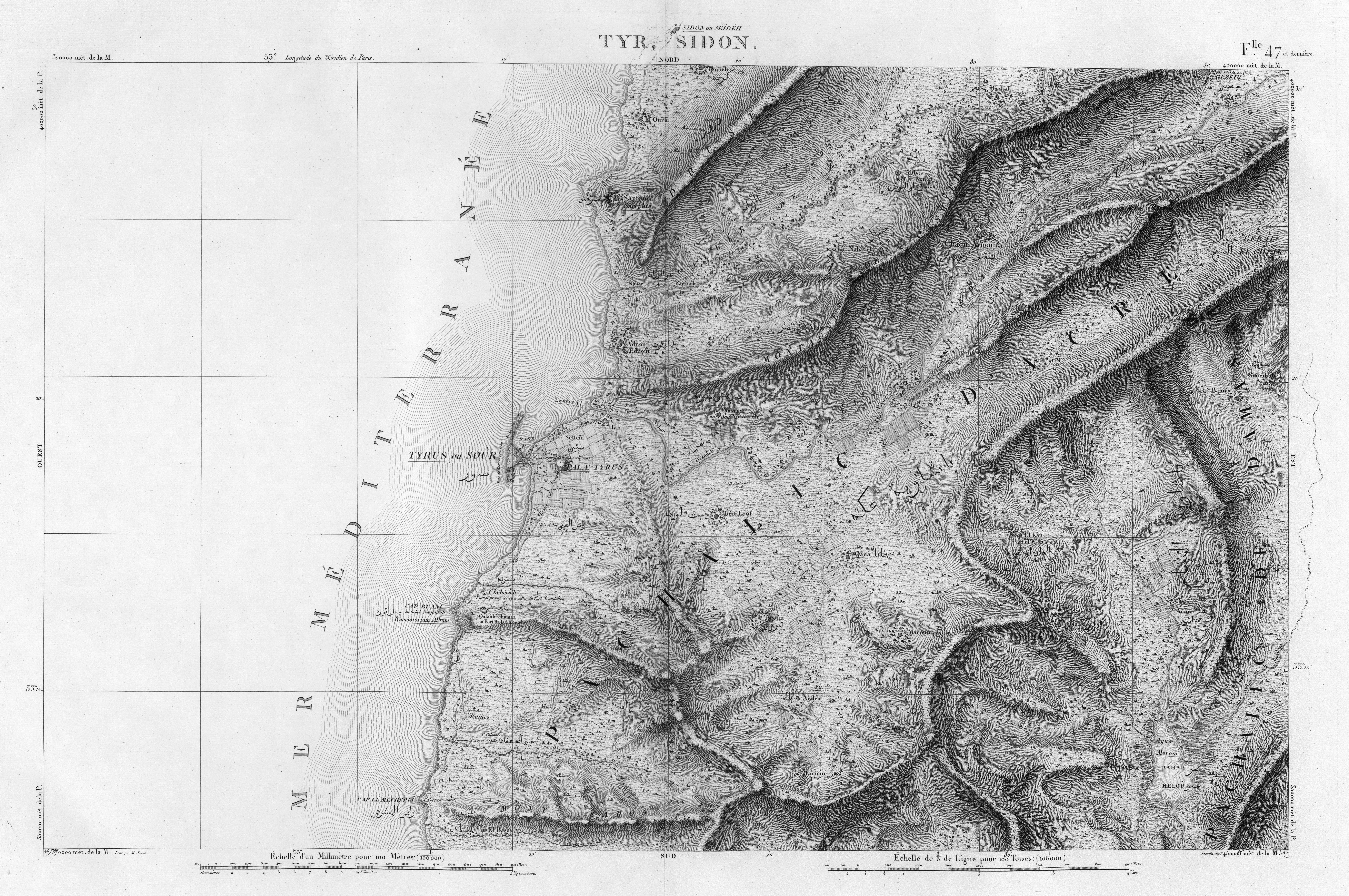 Description de l'Egypte - Atlas - F.47 - Tyre Sidon